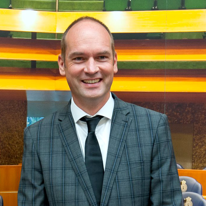 ChristenUnie Tweede Kamerlid Gert-Jan Segers op de foto tijdens de Open Dag van de ChristenUnie in Den Haag.